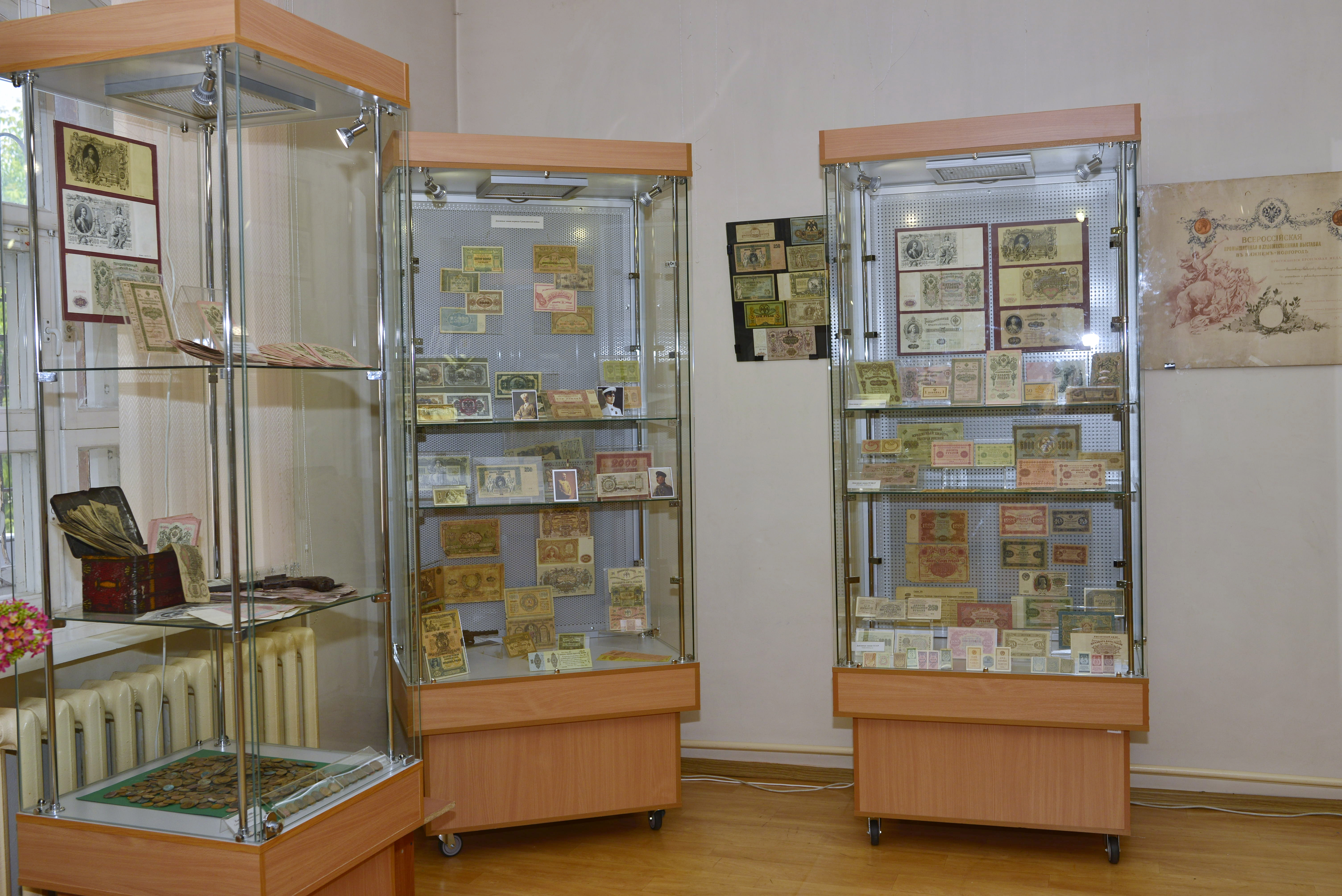 Нумизматическая коллекция Кировского областного краеведческого музея